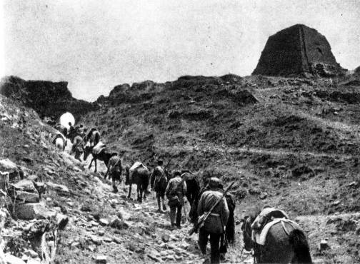 1938年，八路军挺进第四纵队，进入冀东参加蓟东抗日武装大暴动。